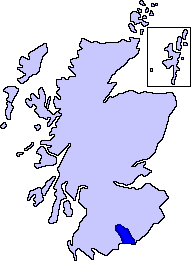 Историческая область Аннандейл, Шотландия Примерные границы исторической области Аннандейл, Шотландия